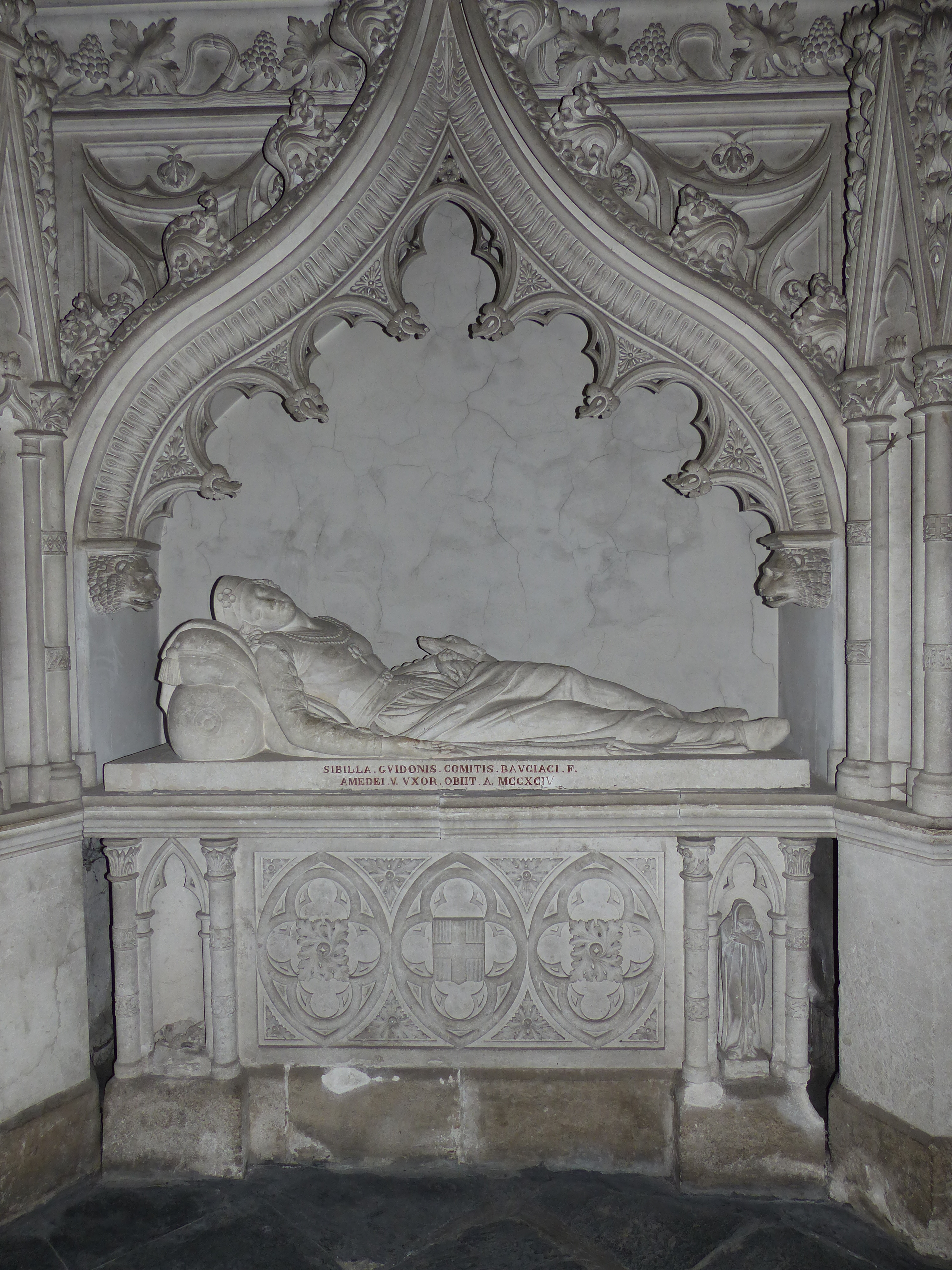 Cénotaphe de Sybille de Baugé à l'abbaye d'Hautecombe